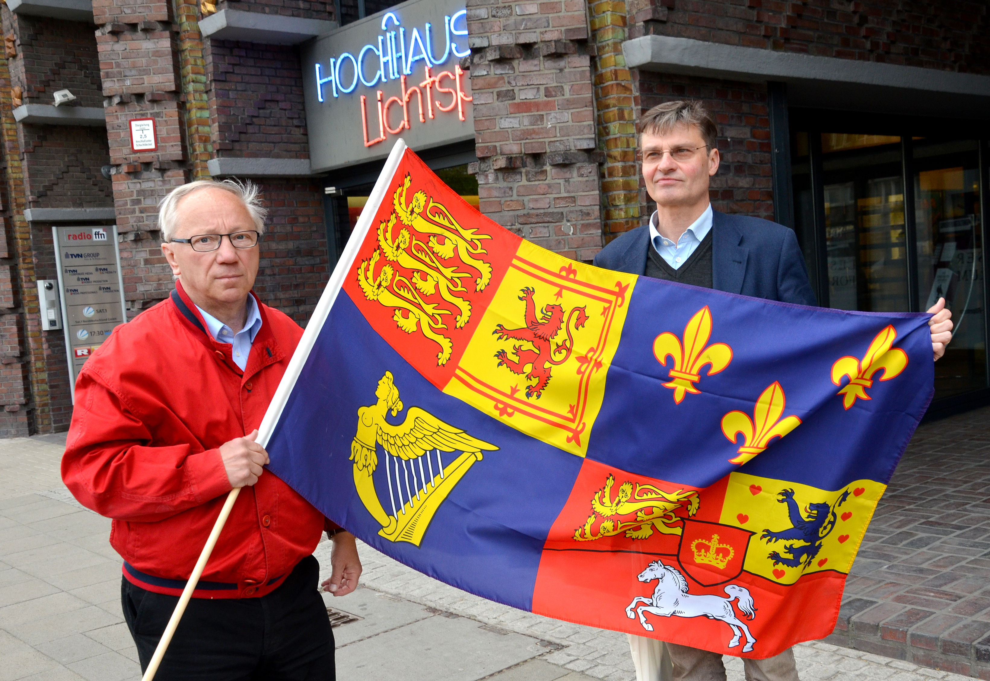 Anlässlich der Lesung „Ein König aus Hannover“, der Romanbiographie von Heinrich Thies über König Georg I. von Großbritannien und Irland, präsentieren der Fotograf Eckard Schrader und Prinz Heinrich vor dem Anzeiger-Hochhaus eine nachgemachte Flagge des Monarchen, mit dem die 123 Jahre währende Personalunion zwischen Großbritannien und Hannover begann ...